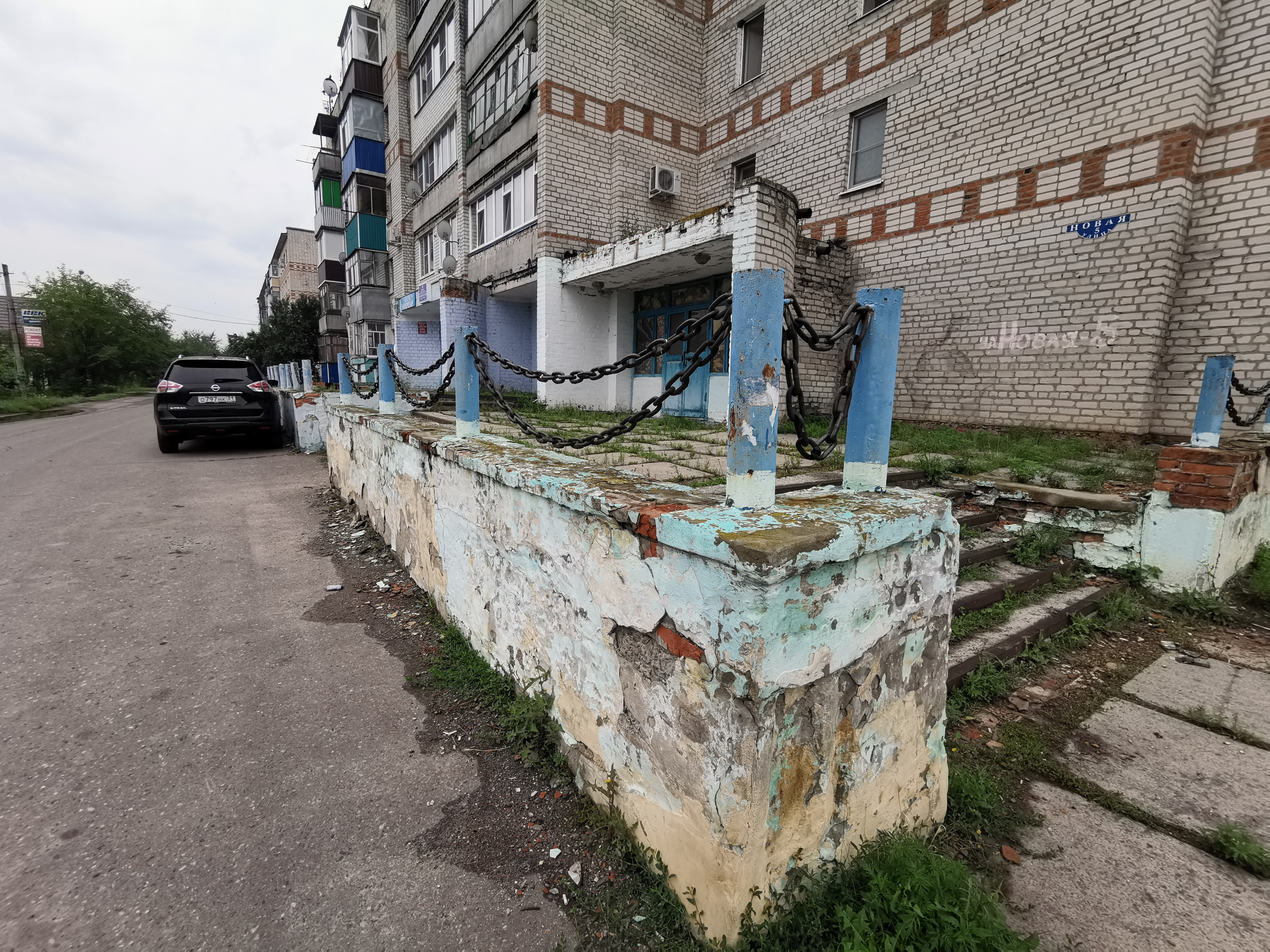 На снимке изображен дом в городе Валуйки, который располагается на улице Новая.